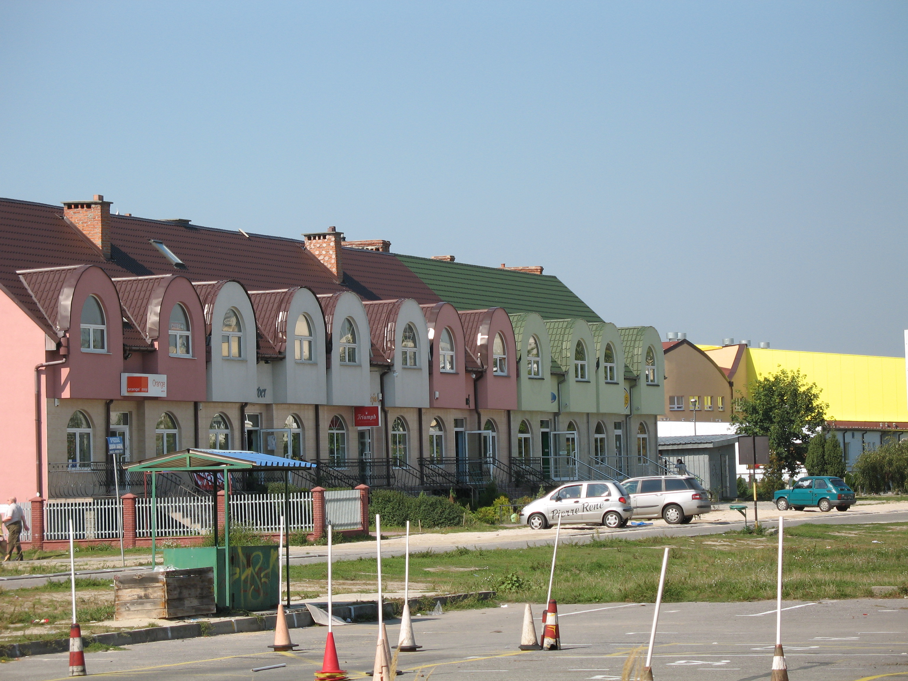 Nowa Sarzyna, author LuCaS